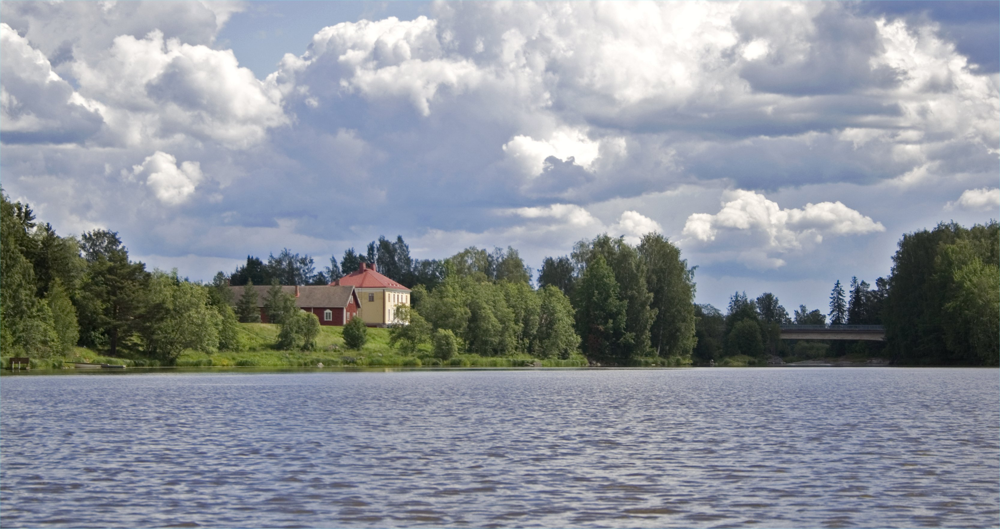 Vuolteen kartano Kokemäellä, kuvattuna Kokemäenjoelta